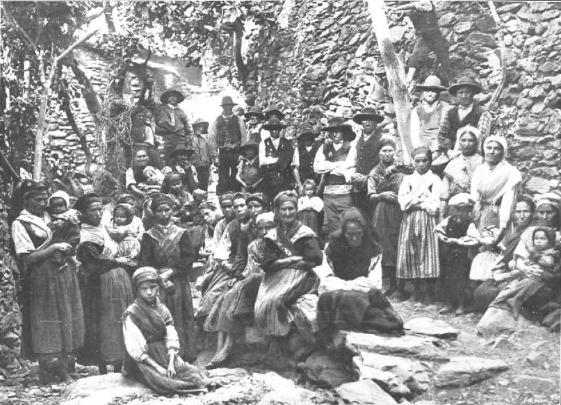 Grupo de jurdanos ante la cámara fotográfica, obra del fotógrafo Venancio Gombau, recogido en la revista española La ilustración española y americana.